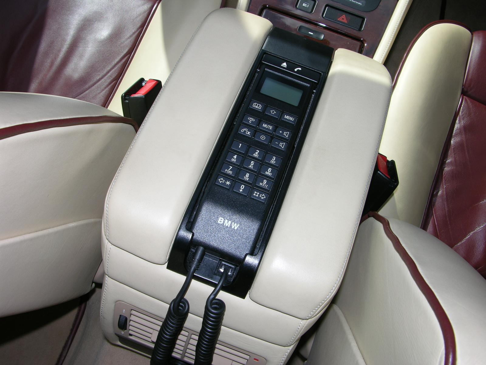 1998 BMW 740i Individual